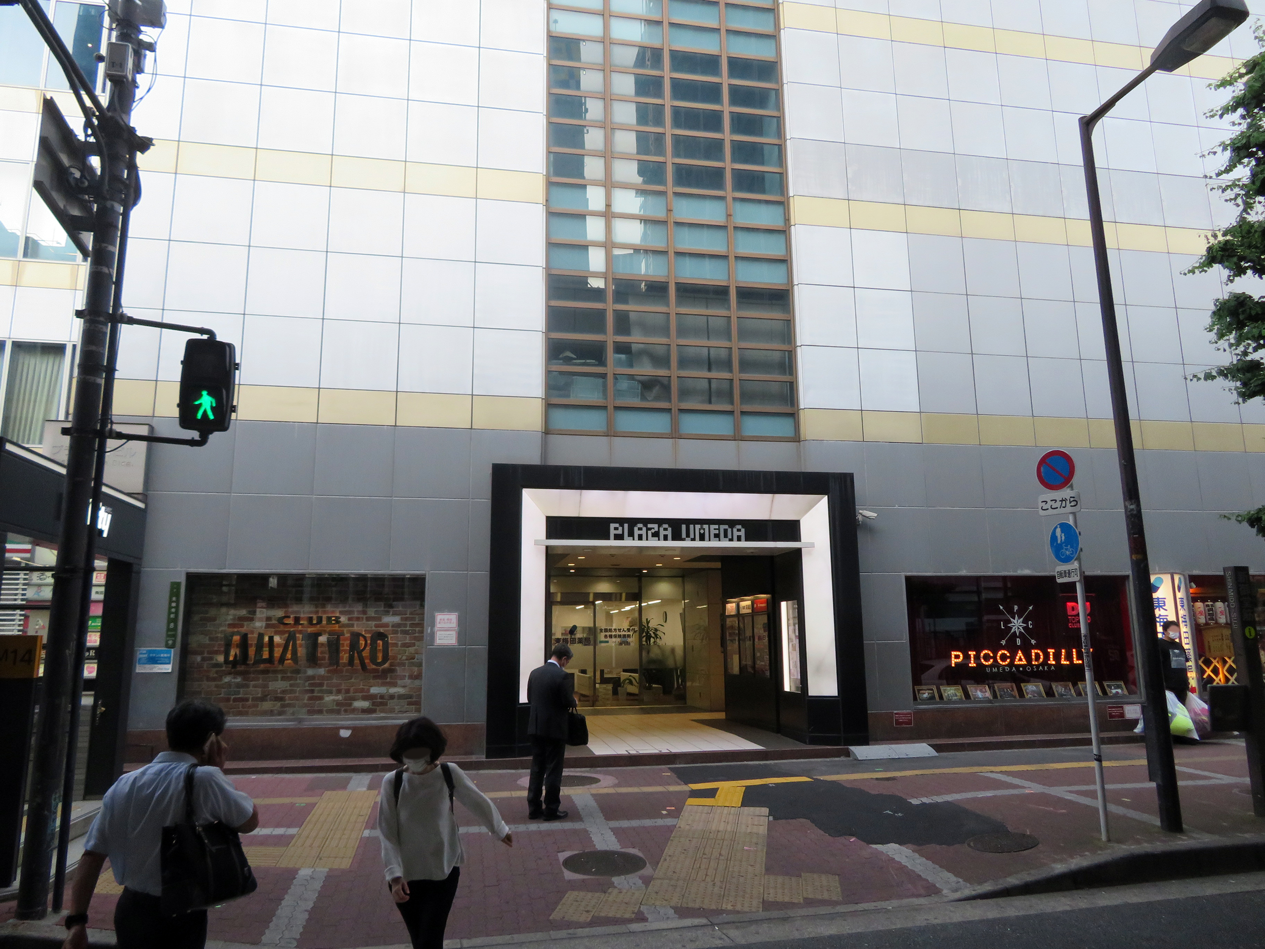 梅田CLUB QUATTROを撮影。